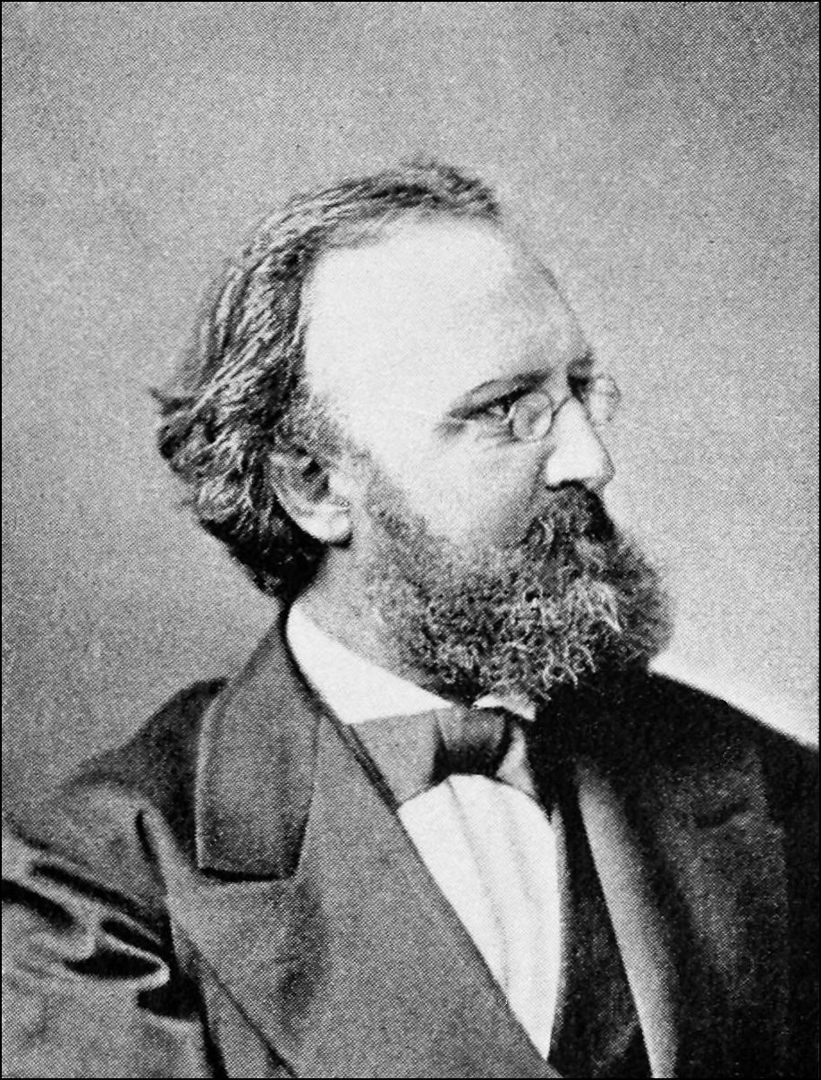 Johannes Ranke